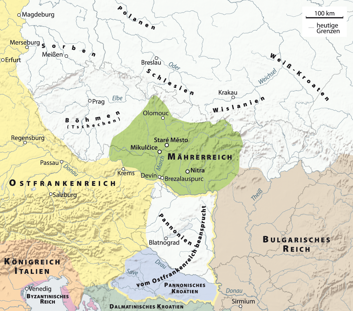 Karte des Mährerreichs unter Mojmír I. Die Darstellung der Gewässer entspricht dem heutigen Stand.